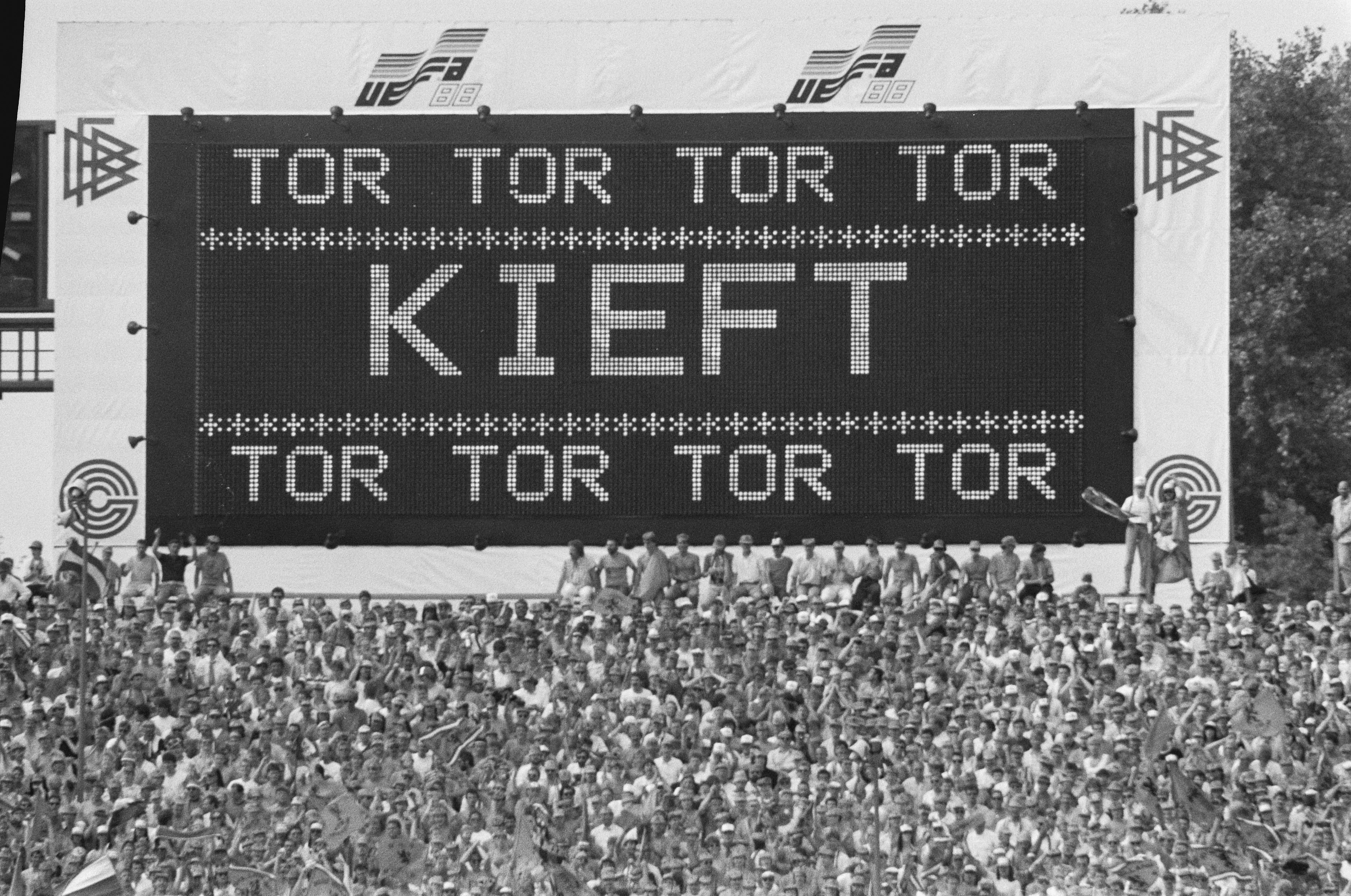 Collectie / Archief : Fotocollectie Anefo Reportage / Serie : [ onbekend ] Beschrijving : EK voetbal in West Duitsland ; Nederland tegen Ierland. Doelpunt Willem Kieft Datum : 18 juni 1988 Locatie : Duitsland, Ierland Trefwoorden : sport, voetbal Instellingsnaam : Fotograaf : Bogaerts, Rob / Anefo Auteursrechthebbende : Nationaal Archief Materiaalsoort : Negatief (zwart/wit) Nummer archiefinventaris : bekijk toegang 2.24.01.05 Bestanddeelnummer : 934-2700